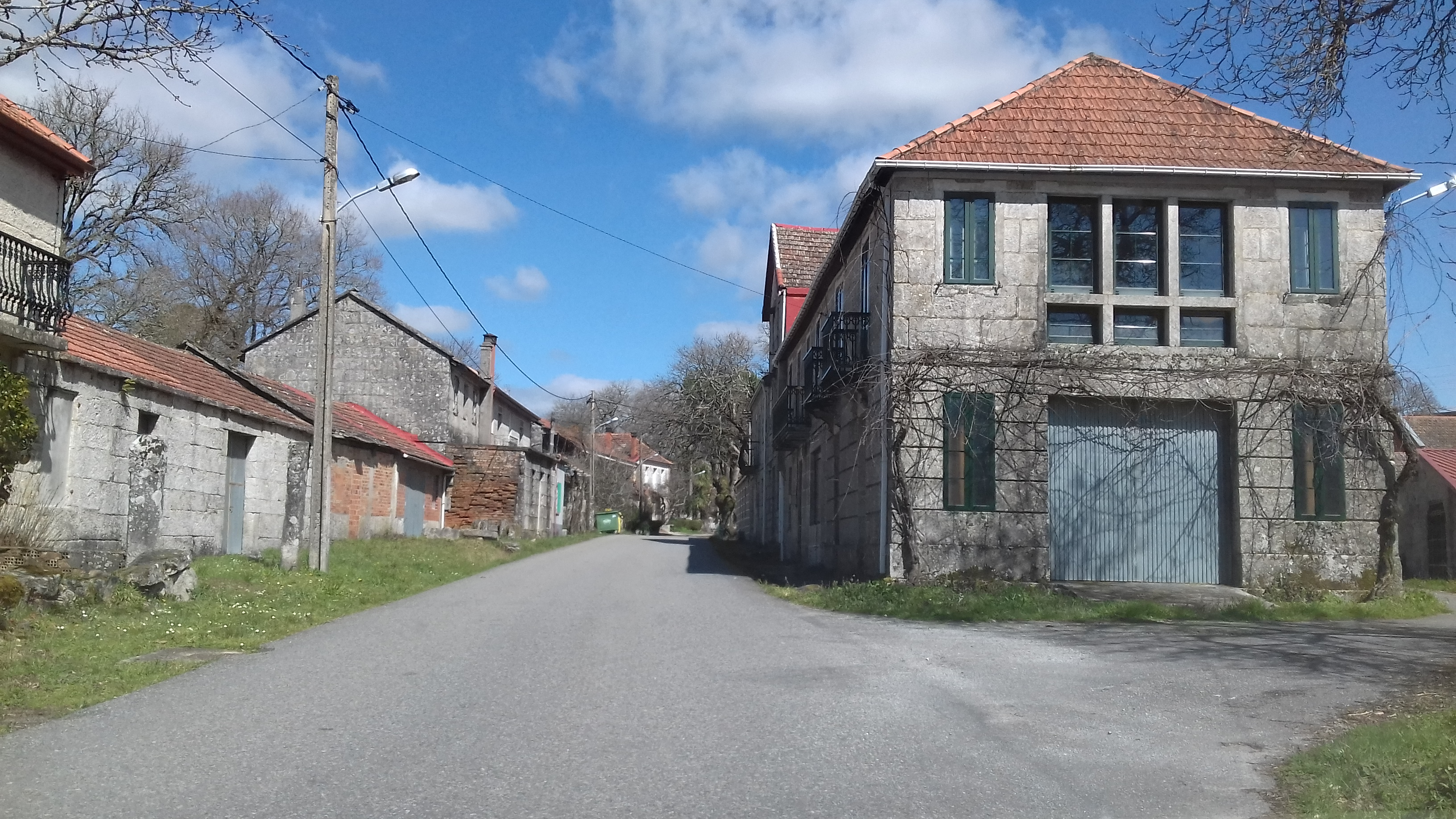 Aldea do Tellado, no Irixo